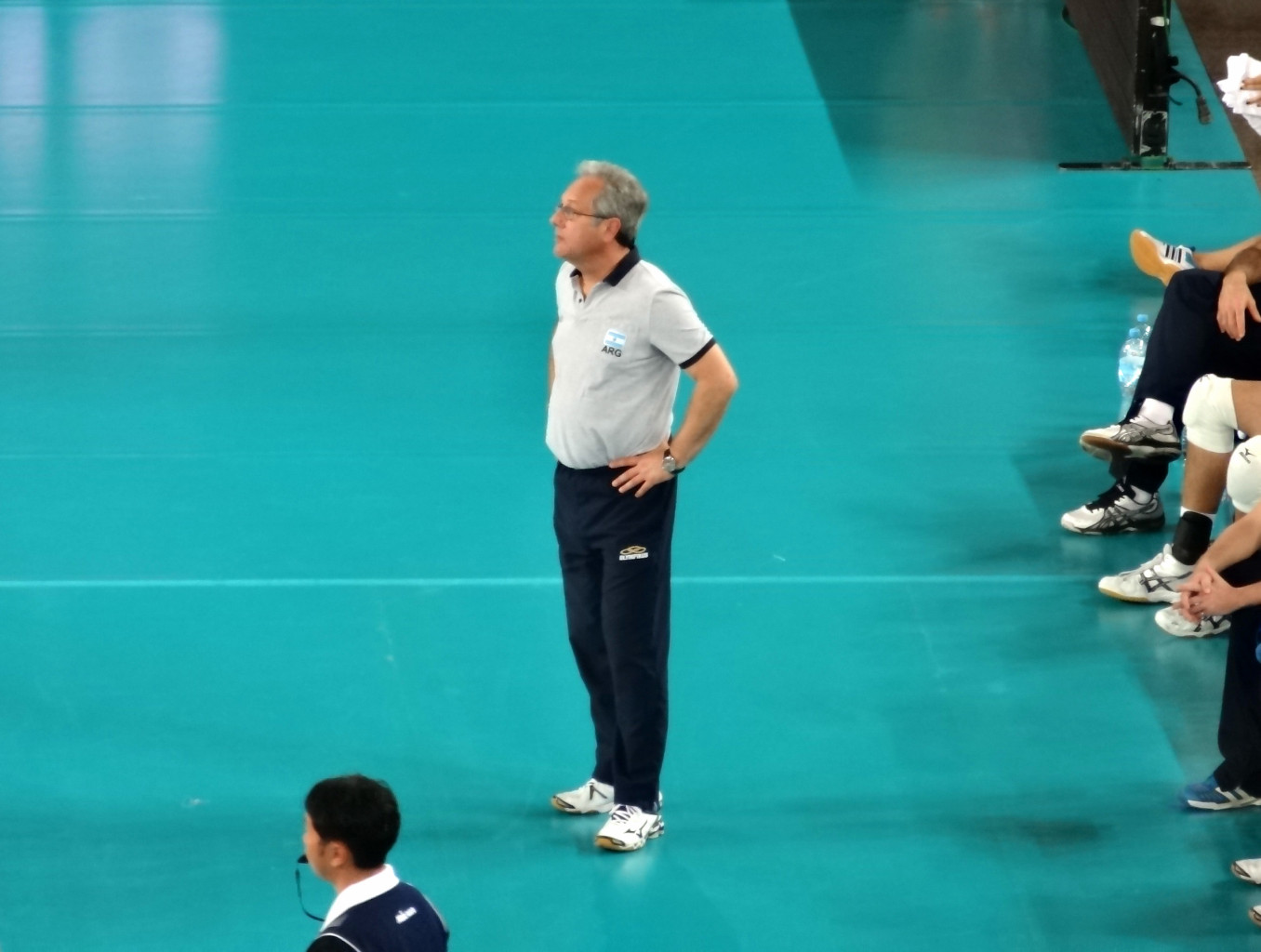 Mecz drugiej fazy grupowej Argentyna - Stany Zjednoczone (3:2) w hali widowiskowo-sportowej "Łuczniczka" w Bydgoszczy podczas Mistrzostw Świata w Piłce Siatkowej Mężczyzn 2014